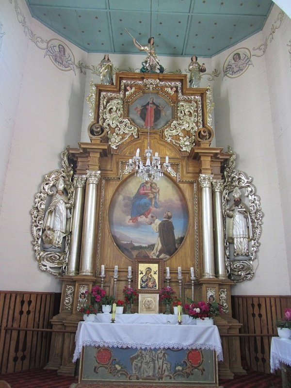 Воўпа. Касцёл Святога Яна Хрысціцеля